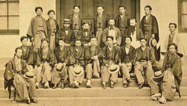 明治13年に卒業した東京大学医学部第２回卒業生の記念写真